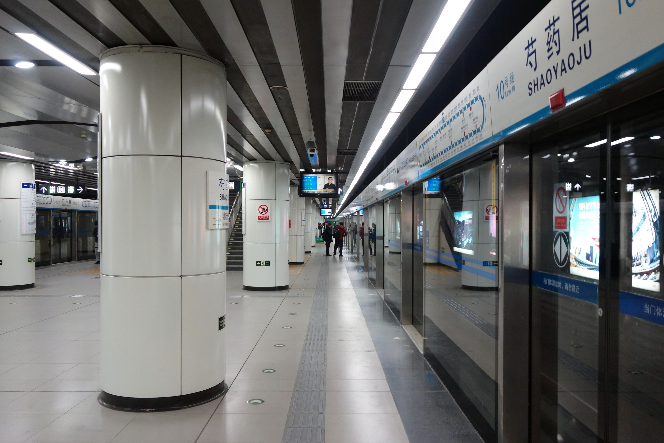 北京地铁10号线芍药居站站台